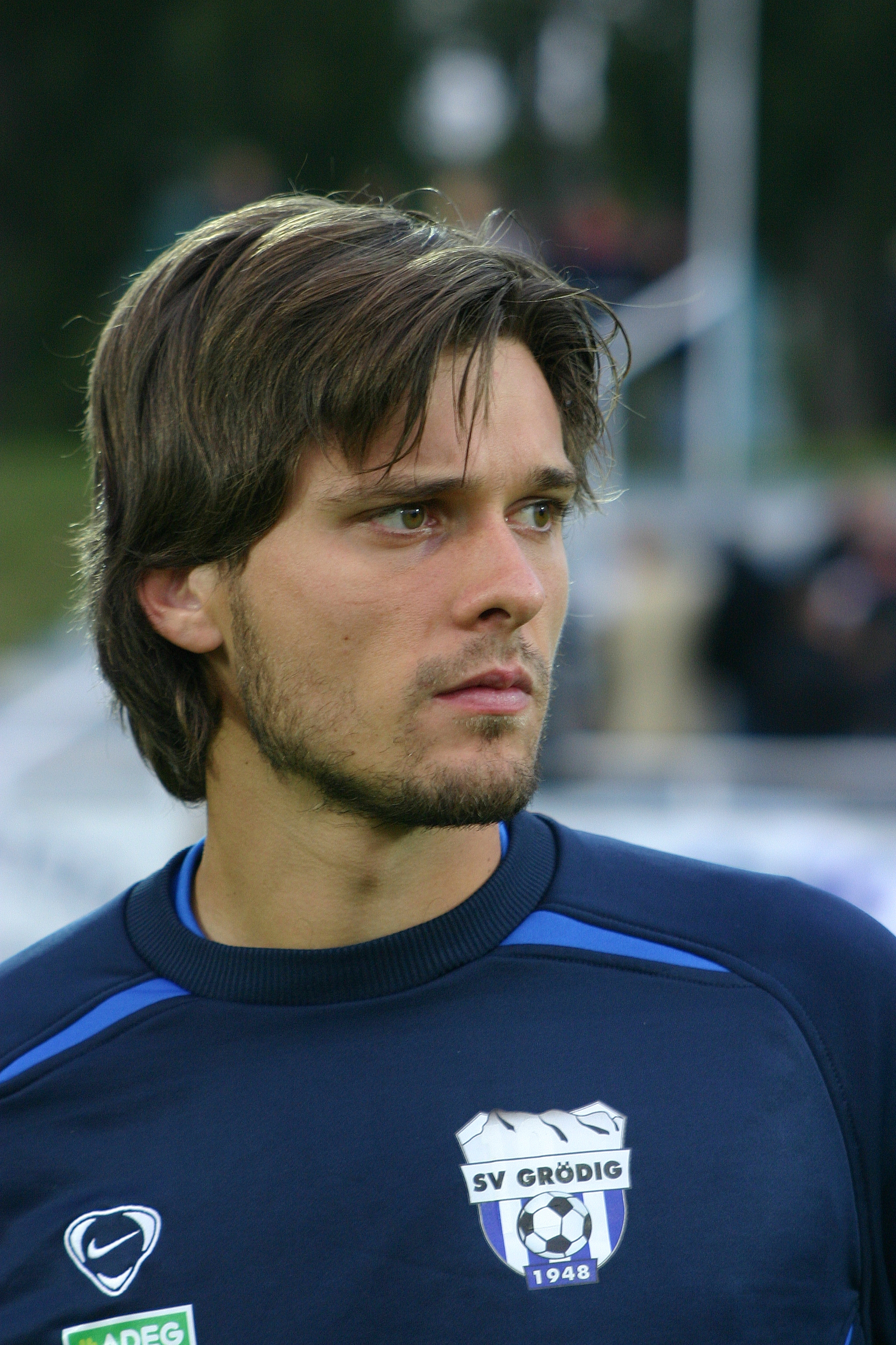 Daniel Kastner – SV Grödig